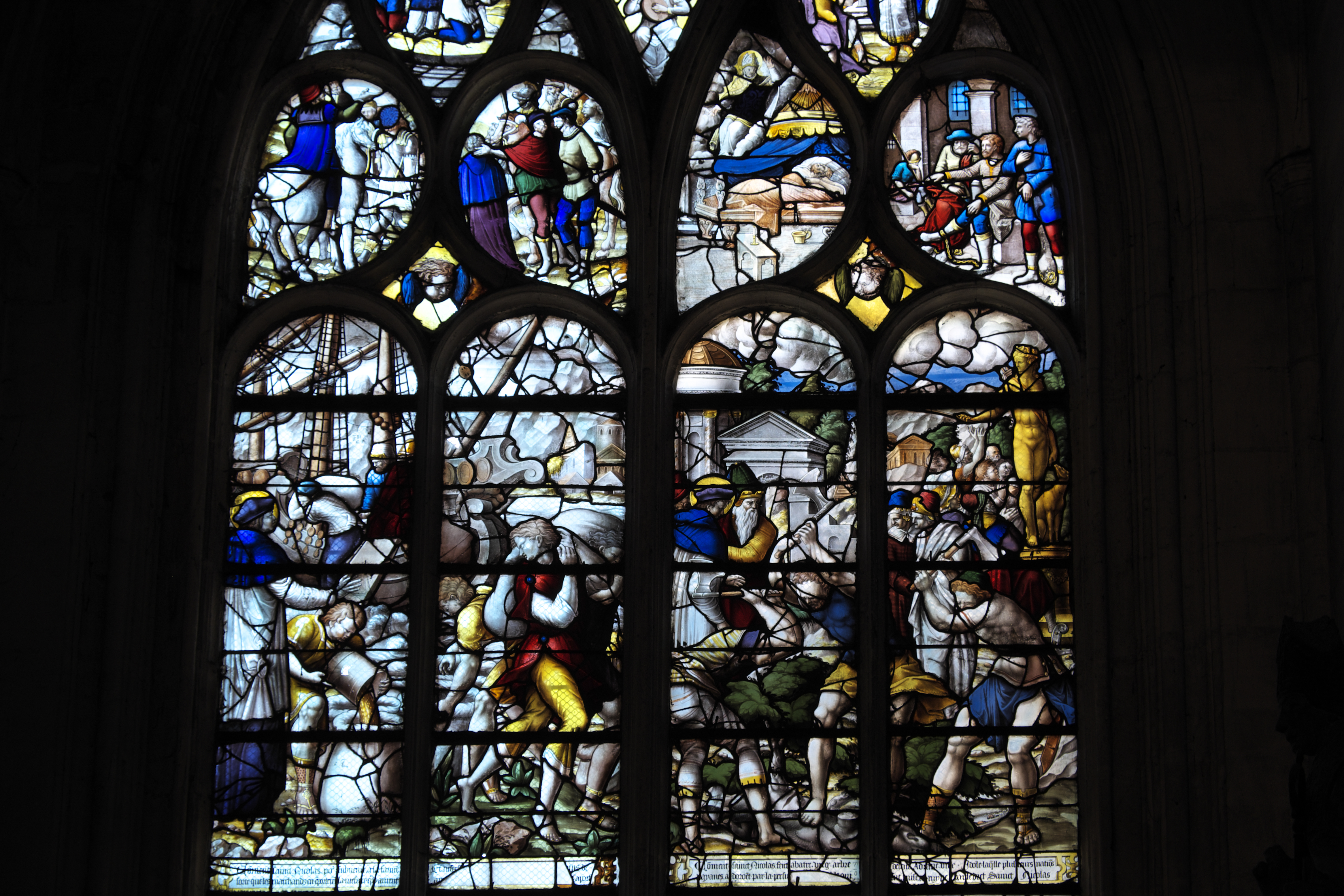 Katholische Kirche Saint-Ouen in Pont-Audemer im Département Eure (Haute-Normandie/Frankreich), Bleiglasfenster aus dem 16. Jahrhundert, Darstellung: Wunder des hl. Nikolaus